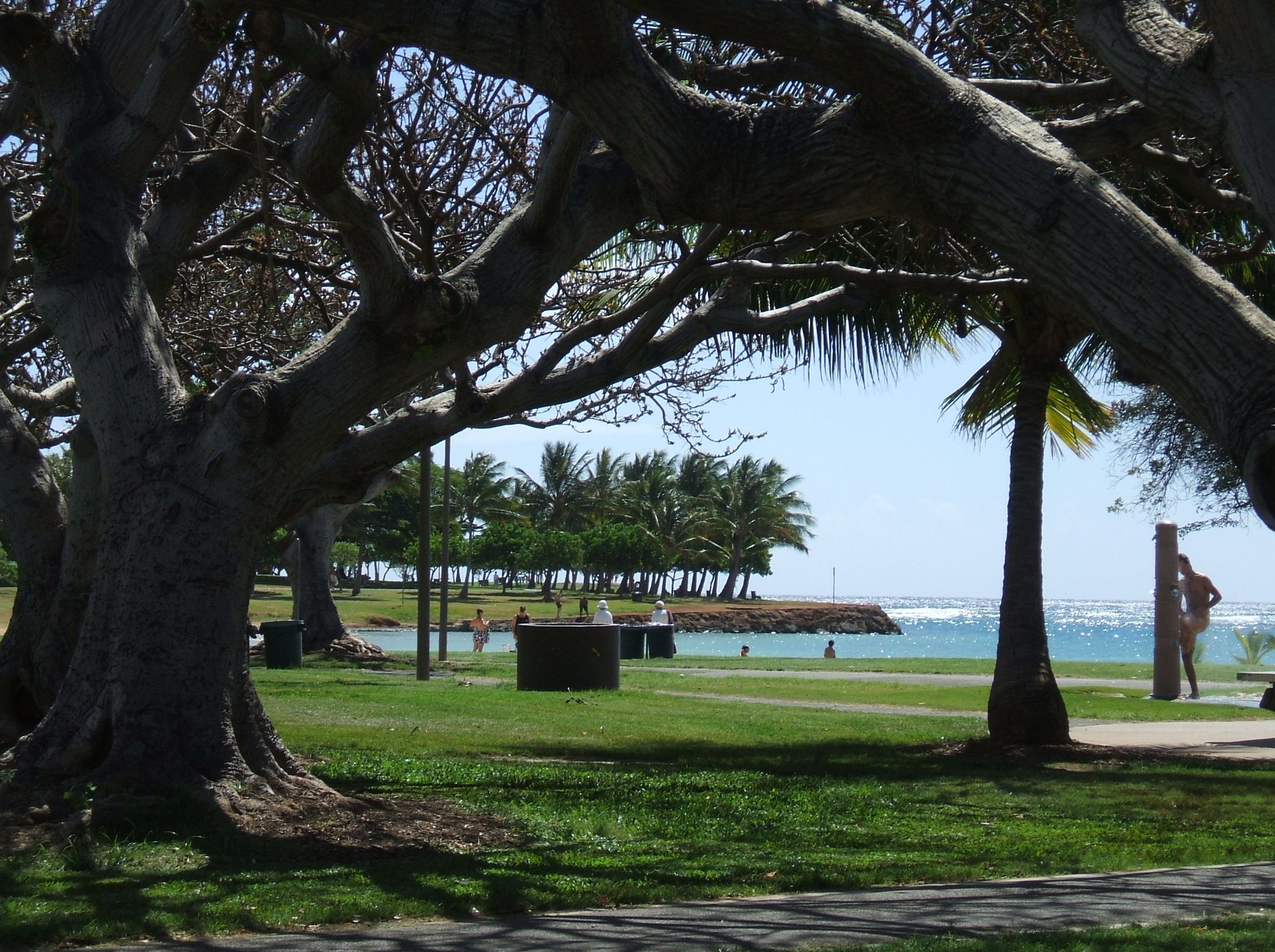 Hawaii, zeljko